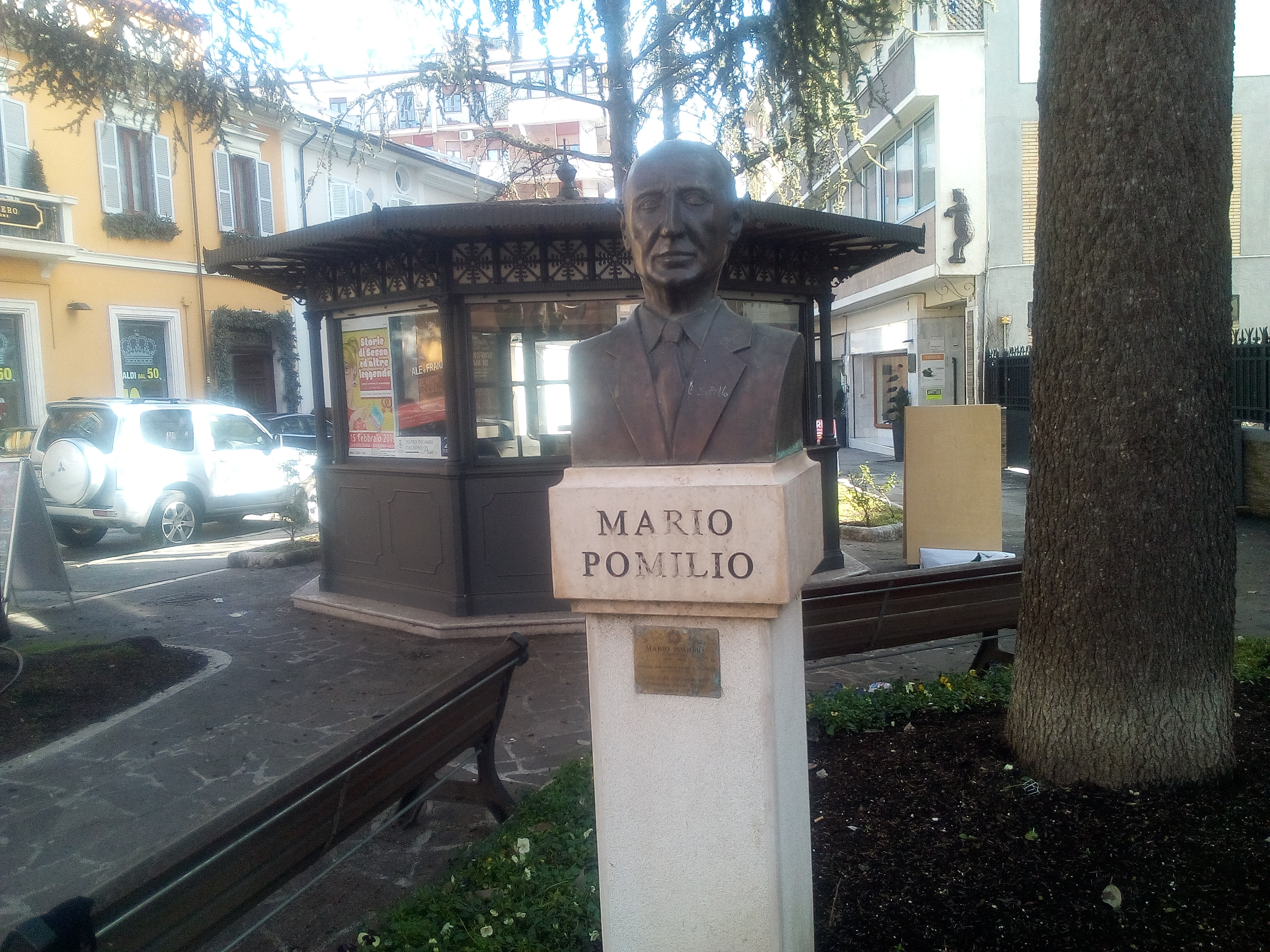 Busto bronzeo di Mario Pomilio ad Avezzano